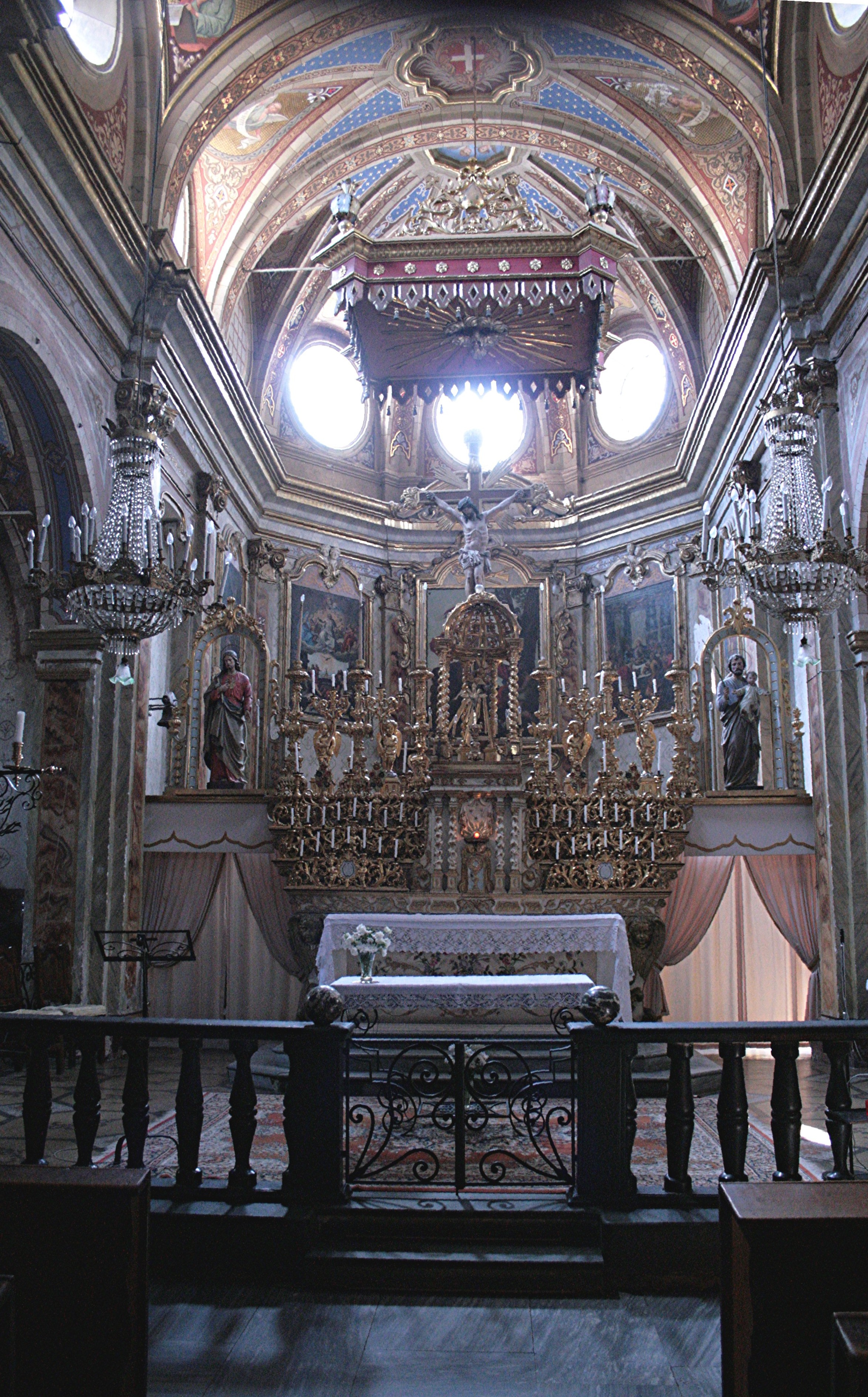 La Brigue, Alpes-Maritimes, France, collégiale Saint-Martin, le choeur baroque